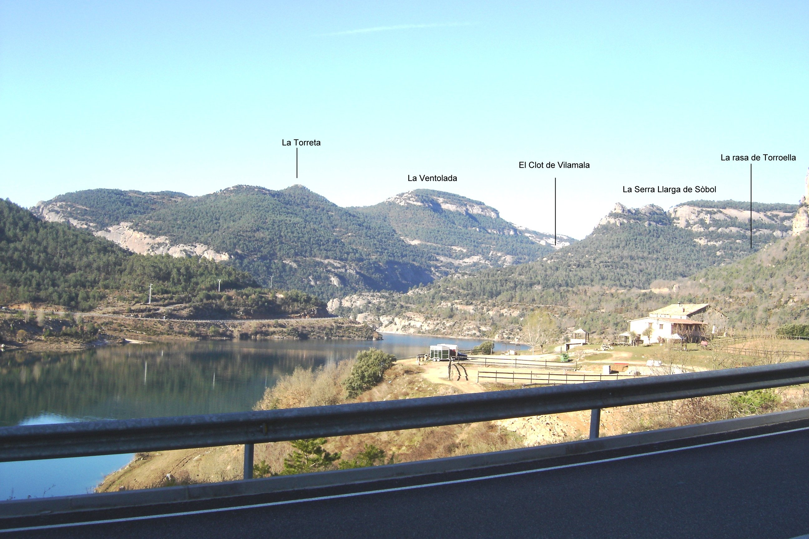 La Ventolada, La Torreta, el Clot de Vilamala, la Serra llarga de Sòbol i la rasa de Torroella (Solsonès) vistos des de les Cases de Posada.